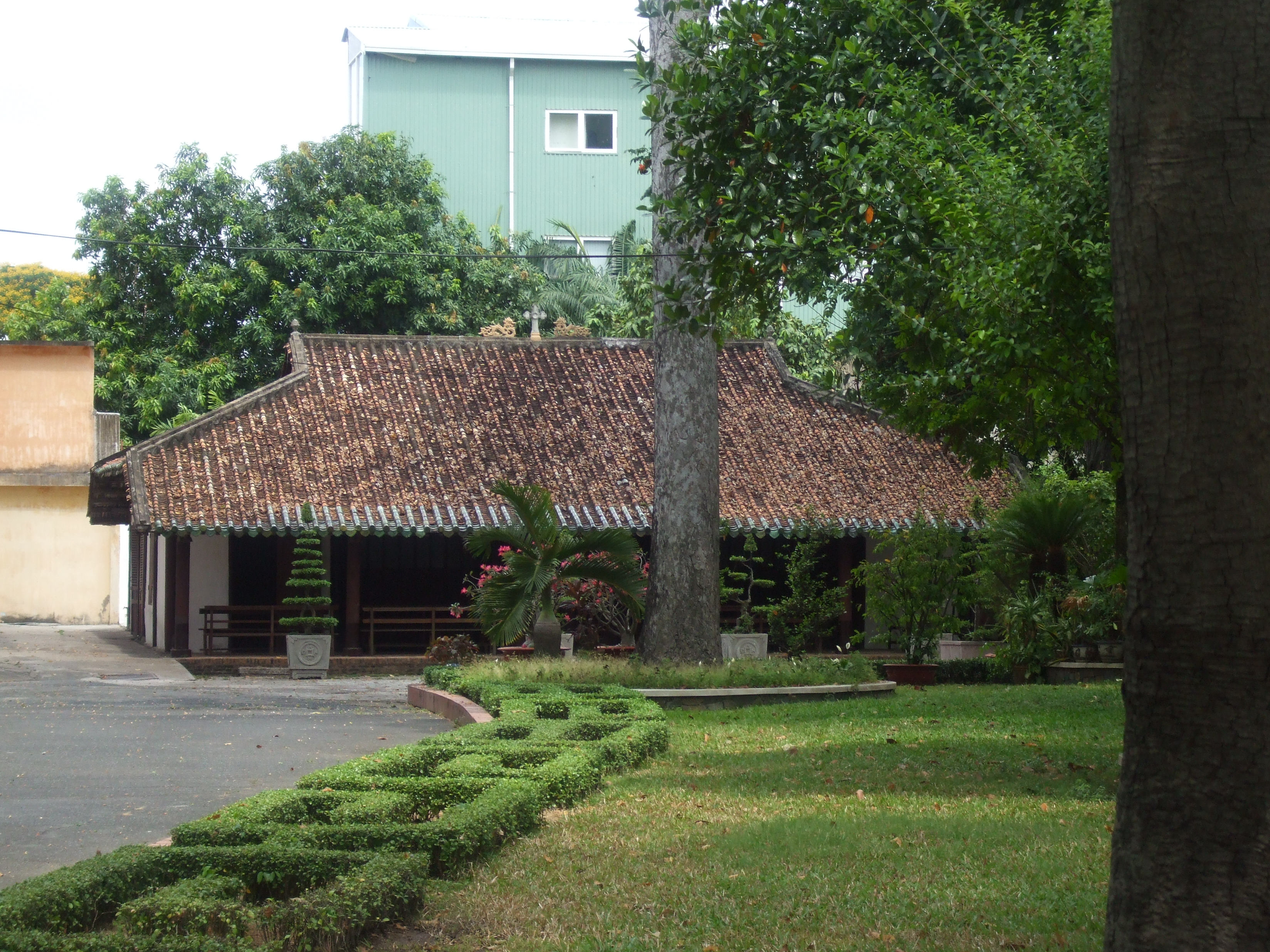 Nhà nguyện Bá Đa Lộc, hiện tọa lạc trong khuôn viên Tòa Giám mục TP. Hồ Chí Minh. Ngoài giá trị lịch sử, đây còn là một trong số rất ít ngôi nhà cổ còn tồn tại ở Thành phố Hồ Chí Minh.